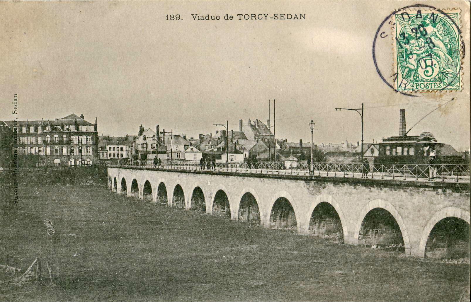 Carte postale ancienne éditée par Suzaine-Pierson à Sedan : Viaduc de Torcy-SEDAN